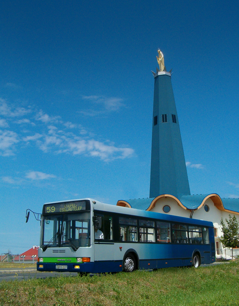 Ikarus 412.10C még eredeti fényezéssel, fiatal korában a Soroksár-újtelepi Fatimai Szűzanya-pébániatemplom előtt